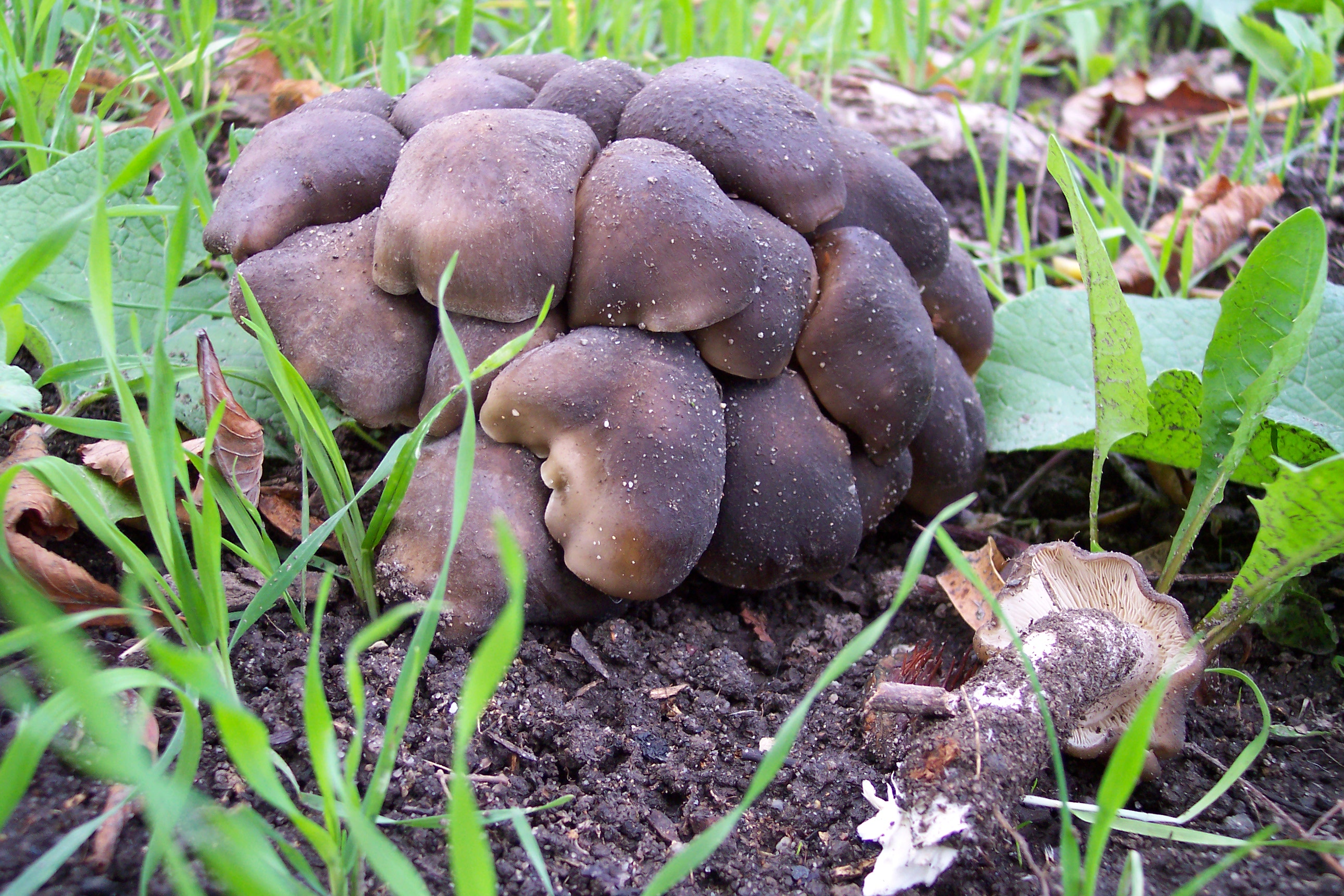 Büscheliger Rasling